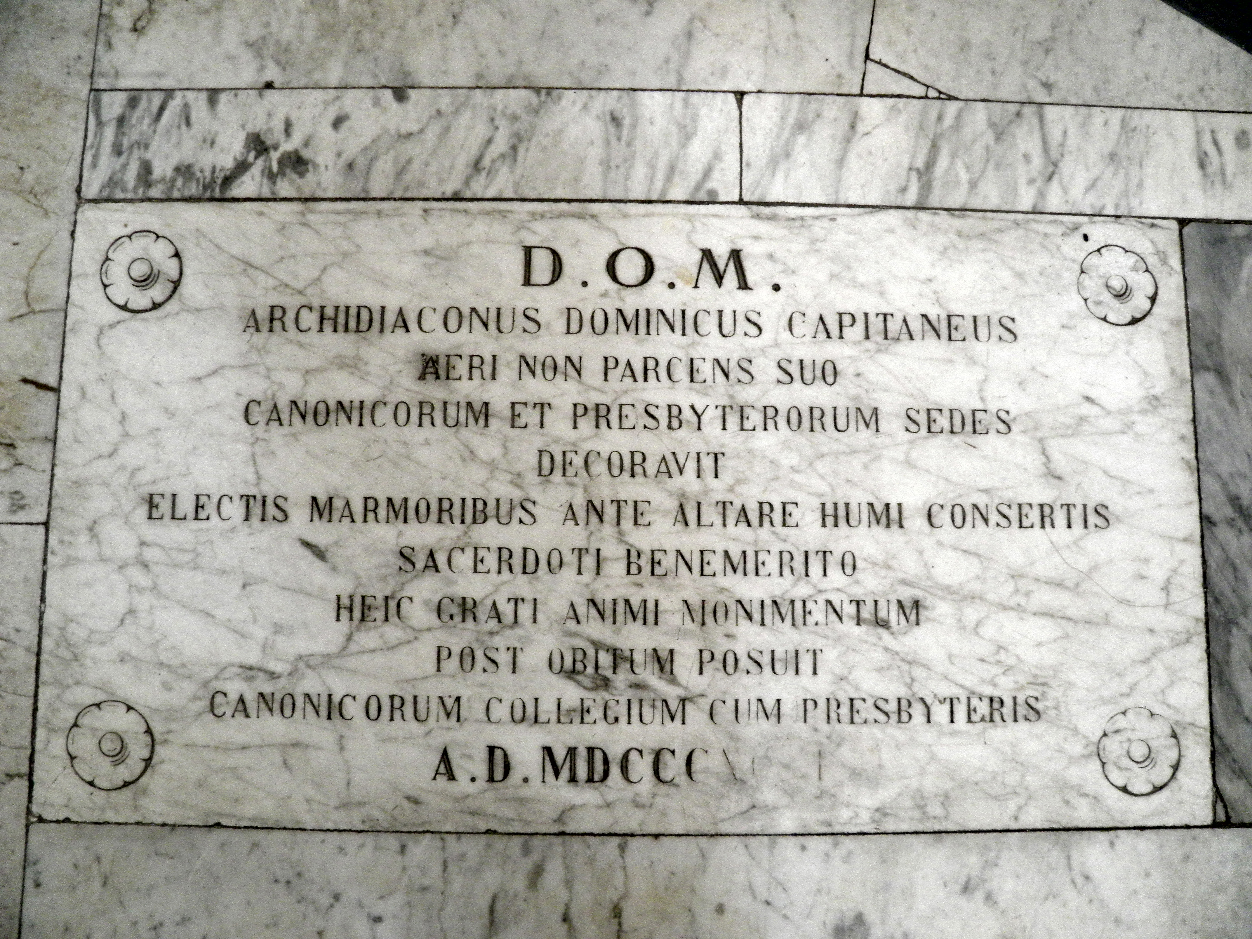 Lapide che ricorda la donazione del pavimento marmoreo del presbiterio della Cattedrale di Monopoli da parte dell'Abate Domenico Capitanio, A.D. MDCCCXCIII